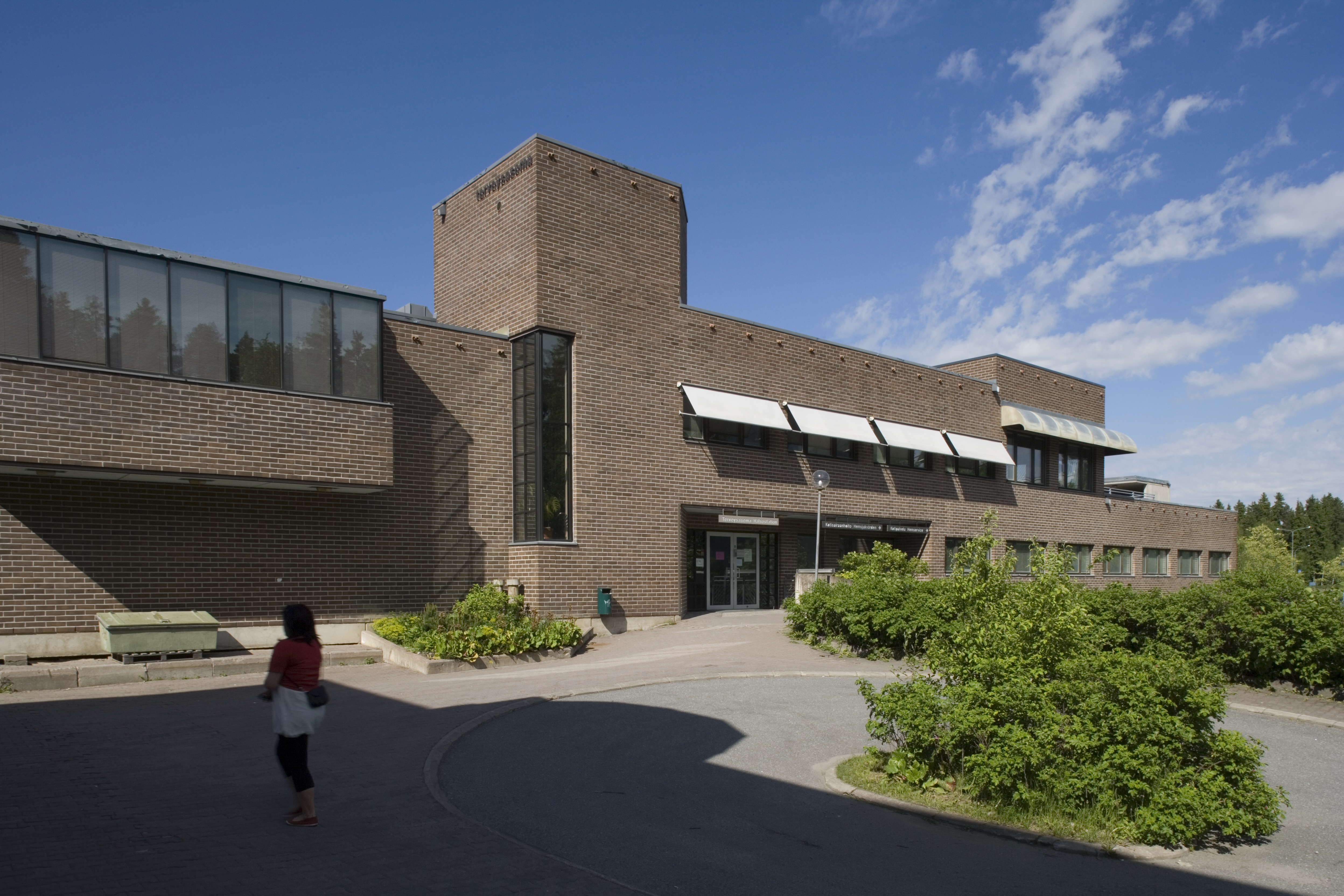 Varissuon terveyskeskus. Arkkitehtitoimisto Pitkänen-Laiho-Raunio, valm. 1983.